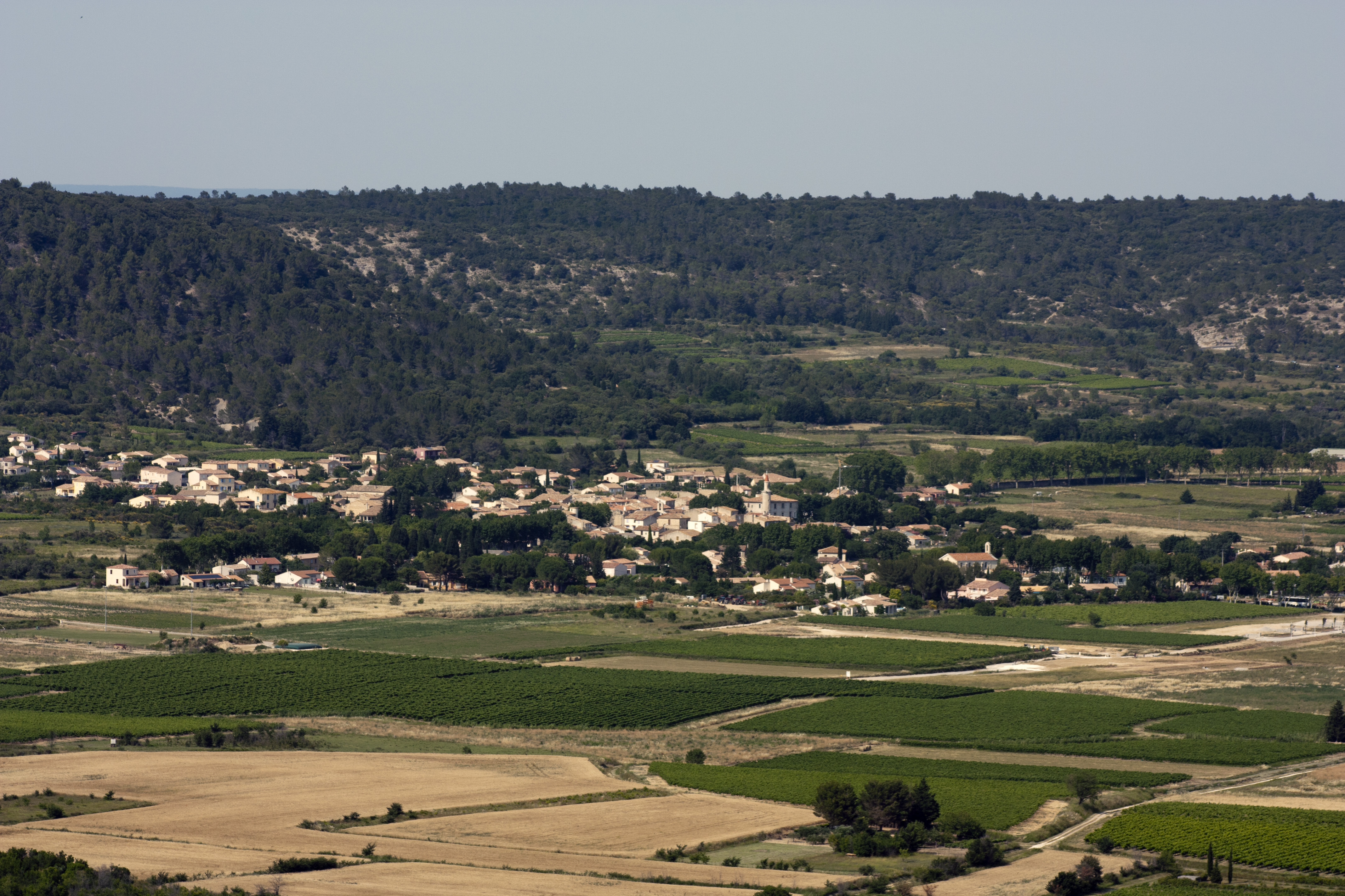 Panoramic view of Saint-Côme-et-Maruéjols, from the Liquière.